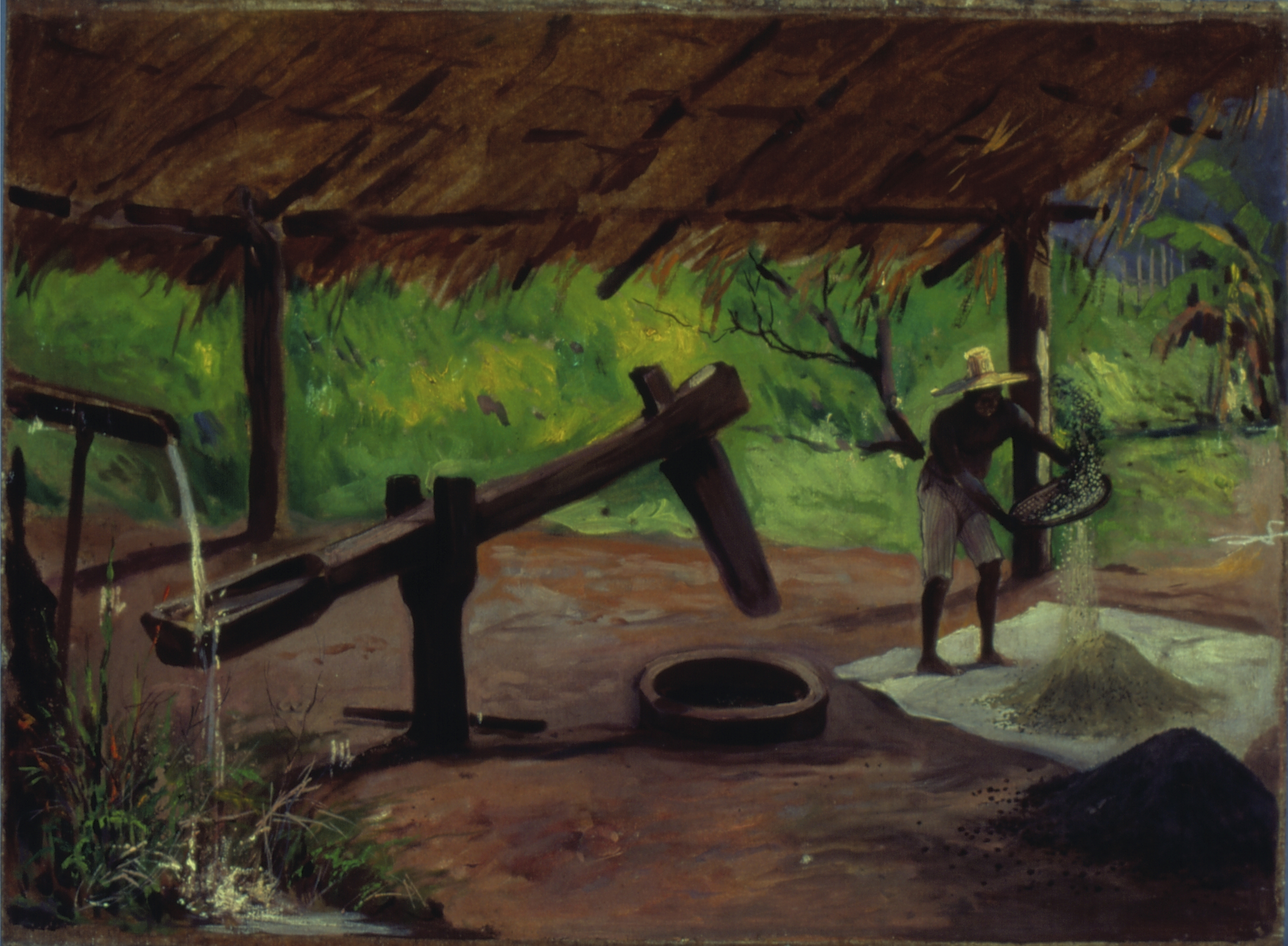 Obra que integra o acervo do Museu Paulista da USP. Coleção Fundo Museu Paulista - FMP